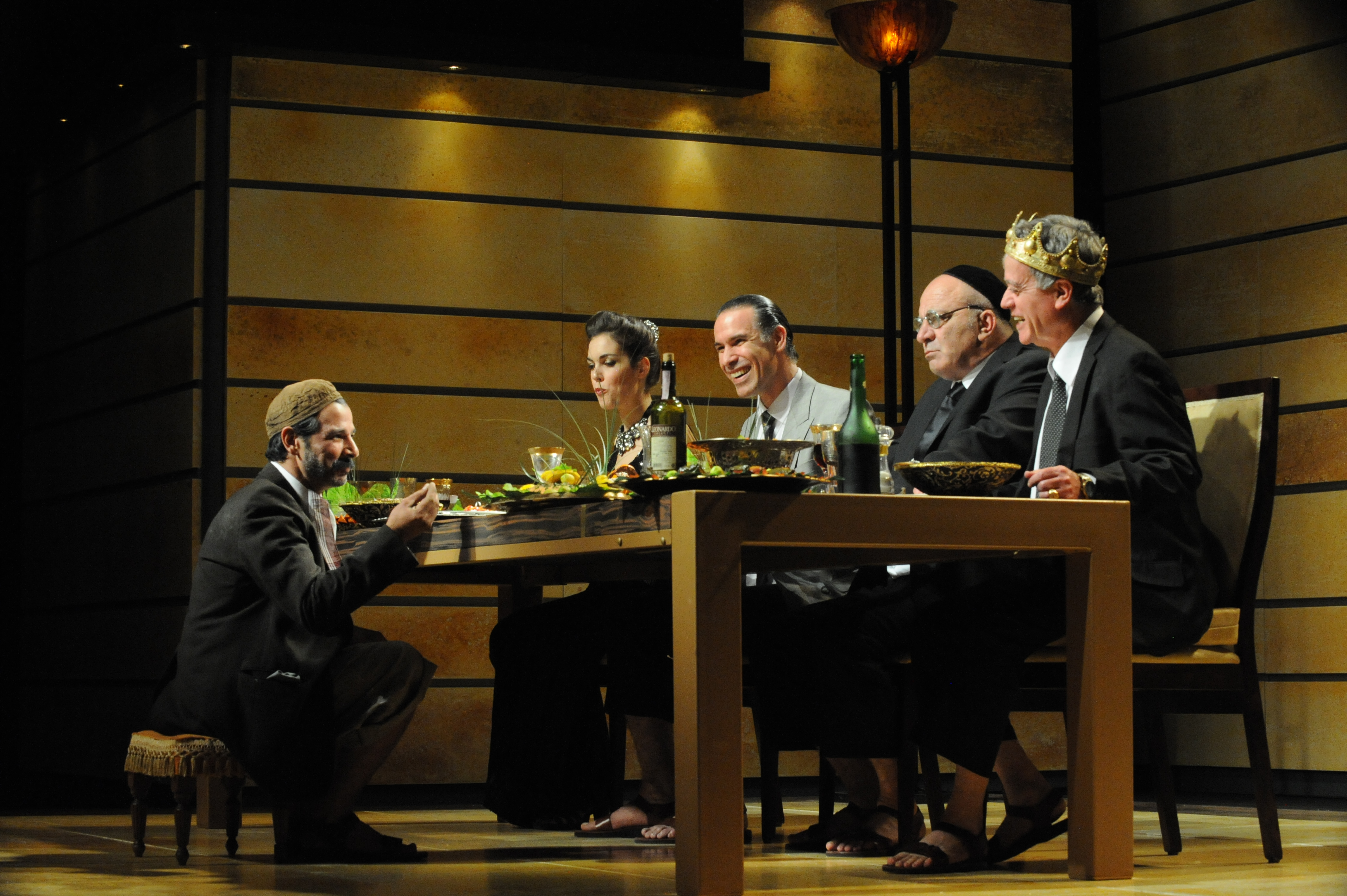 ההצגה "אוכלים" בבימויו של מיקי גורביץ', תיאטרון החאן, מימין לשמאל: יהויכין פרידלנד, אריה צ'רנר, לירון ברנס, נילי רוגל ויוסי עיני